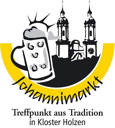 Logo des Johannimarkt in Kloster Holzen